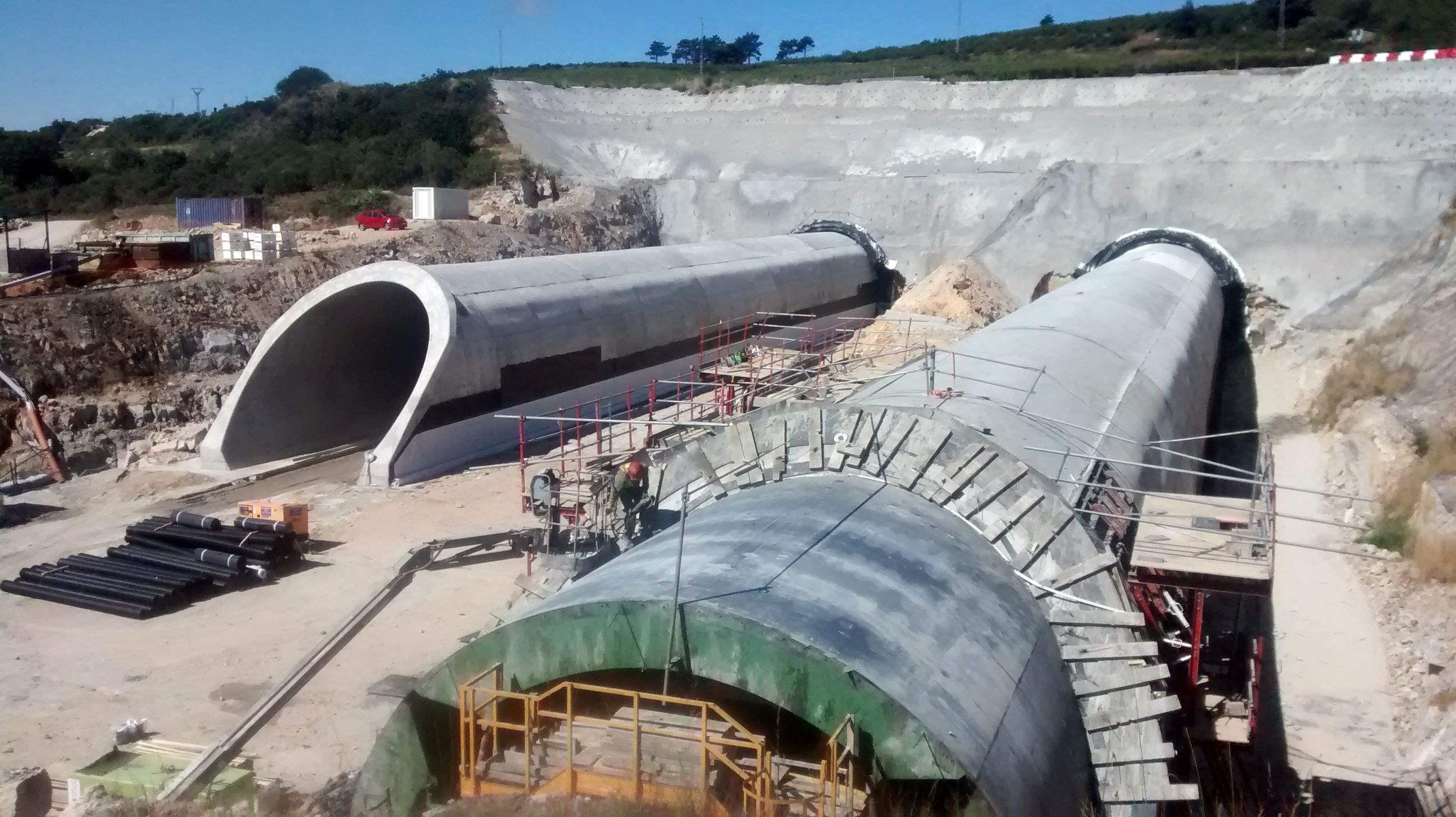 Túneles de la línea de alta velocidad Olmedo-Zamora-Galicia en su tramo Canda-Villavieja en Orense, en el límite de provincia con Zamora.